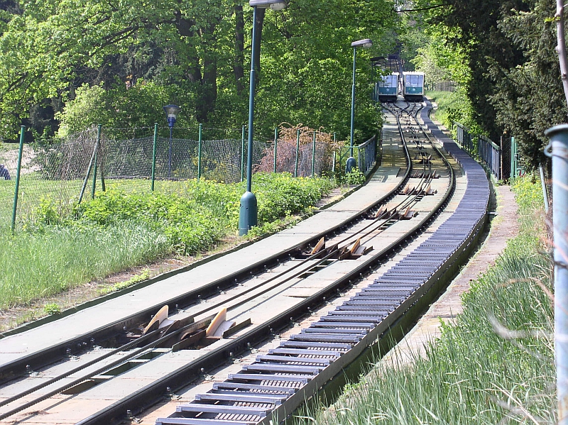 Lanová dráha na Petřín – střídání vozů na výhybně.